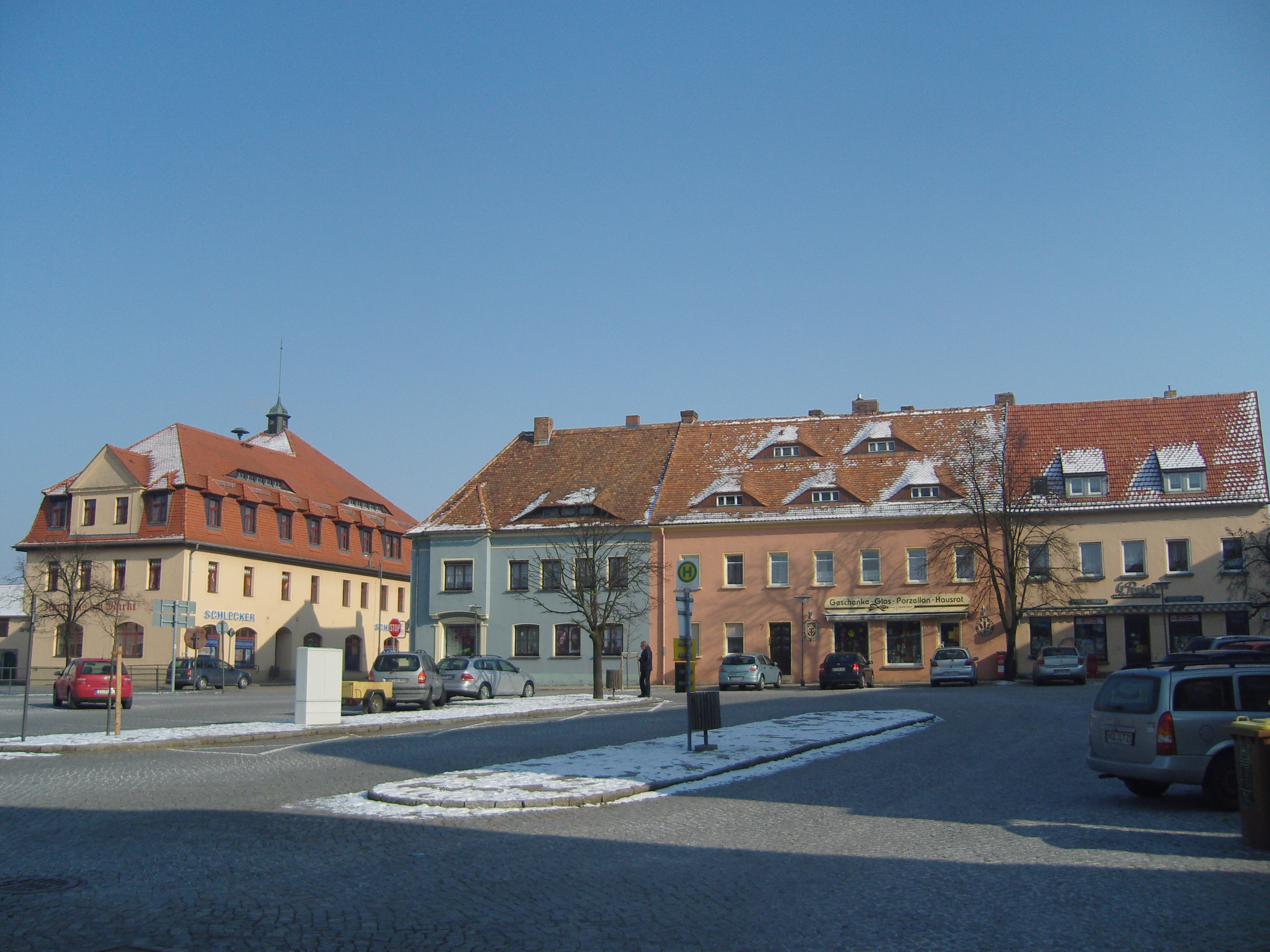 Ansicht des Markts in Weißenberg, Sachsen